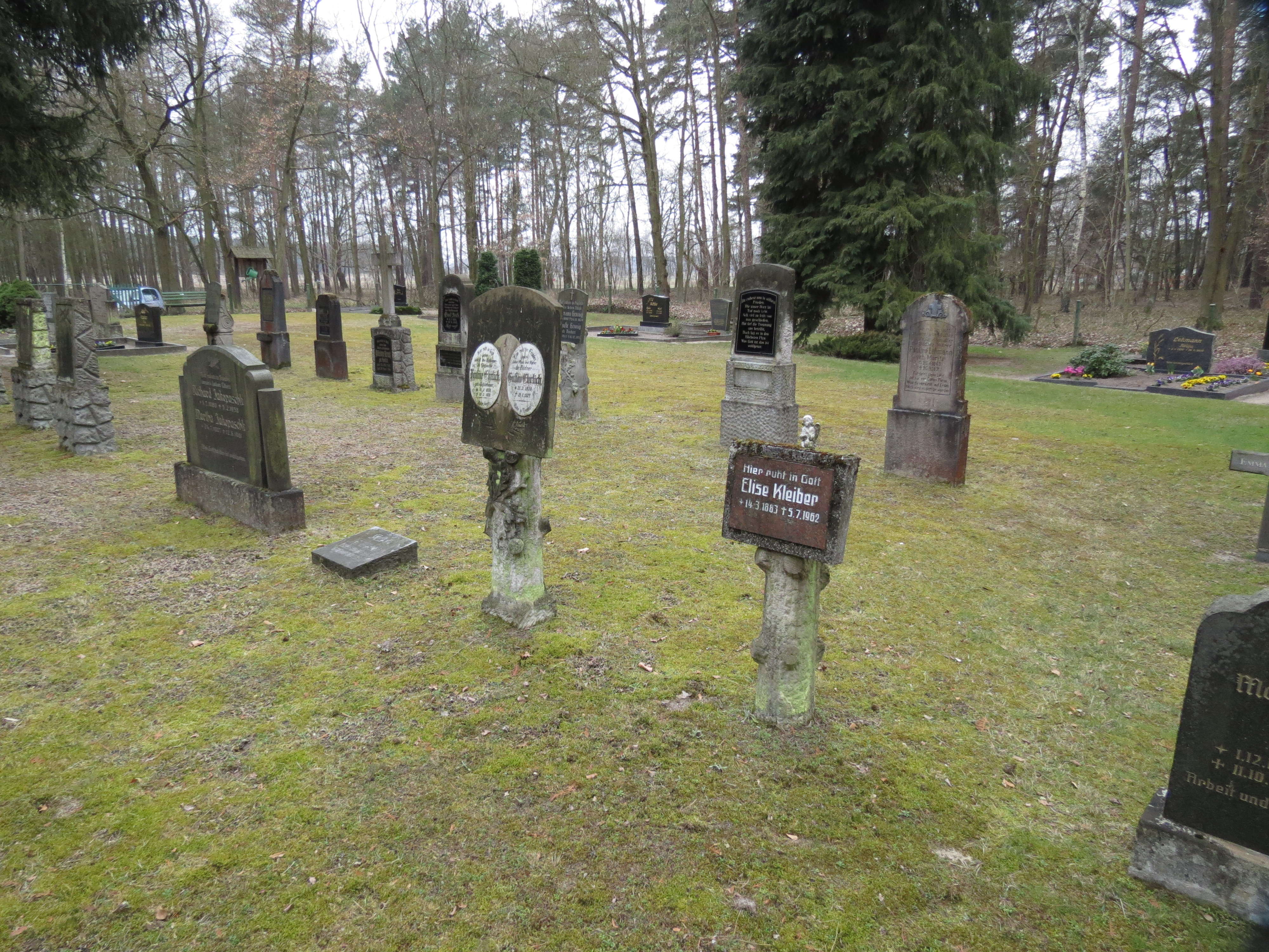 Waldfriedhof, Historisches Gräberfeld, Plattkow, Ortsteil der Gemeinde Märkische Heide, Landkreis Dahme-Spreewald, Brandenburg, Deutschland